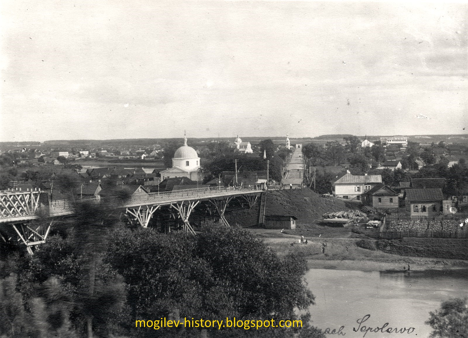 Беларуская (тарашкевіца): Магілёў (Mahiloŭ), панарама Лупалава (Łupałava) і Траечча (Traječča)